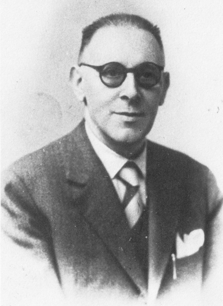 Fotografia di Felice Platone